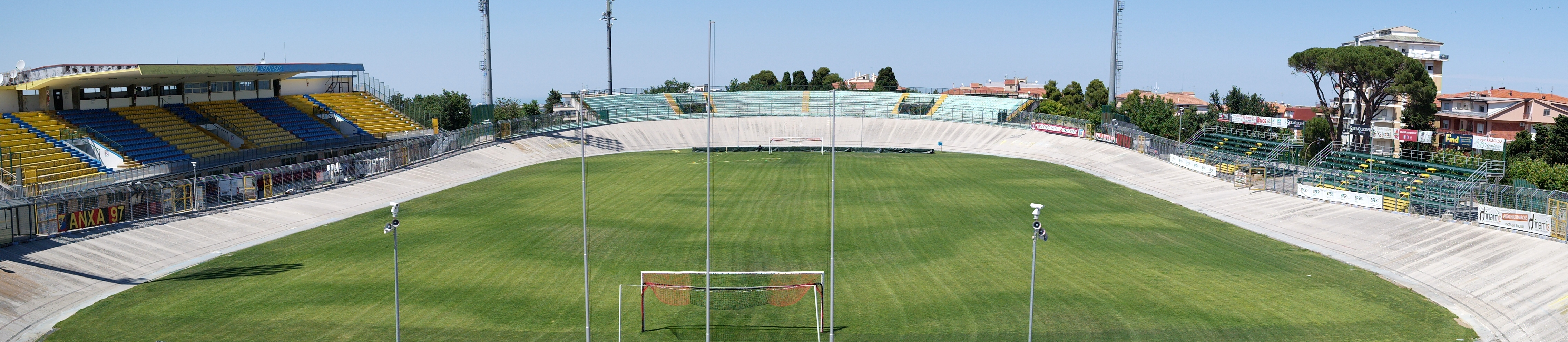 Stadio Guido Biondi di Lanciano